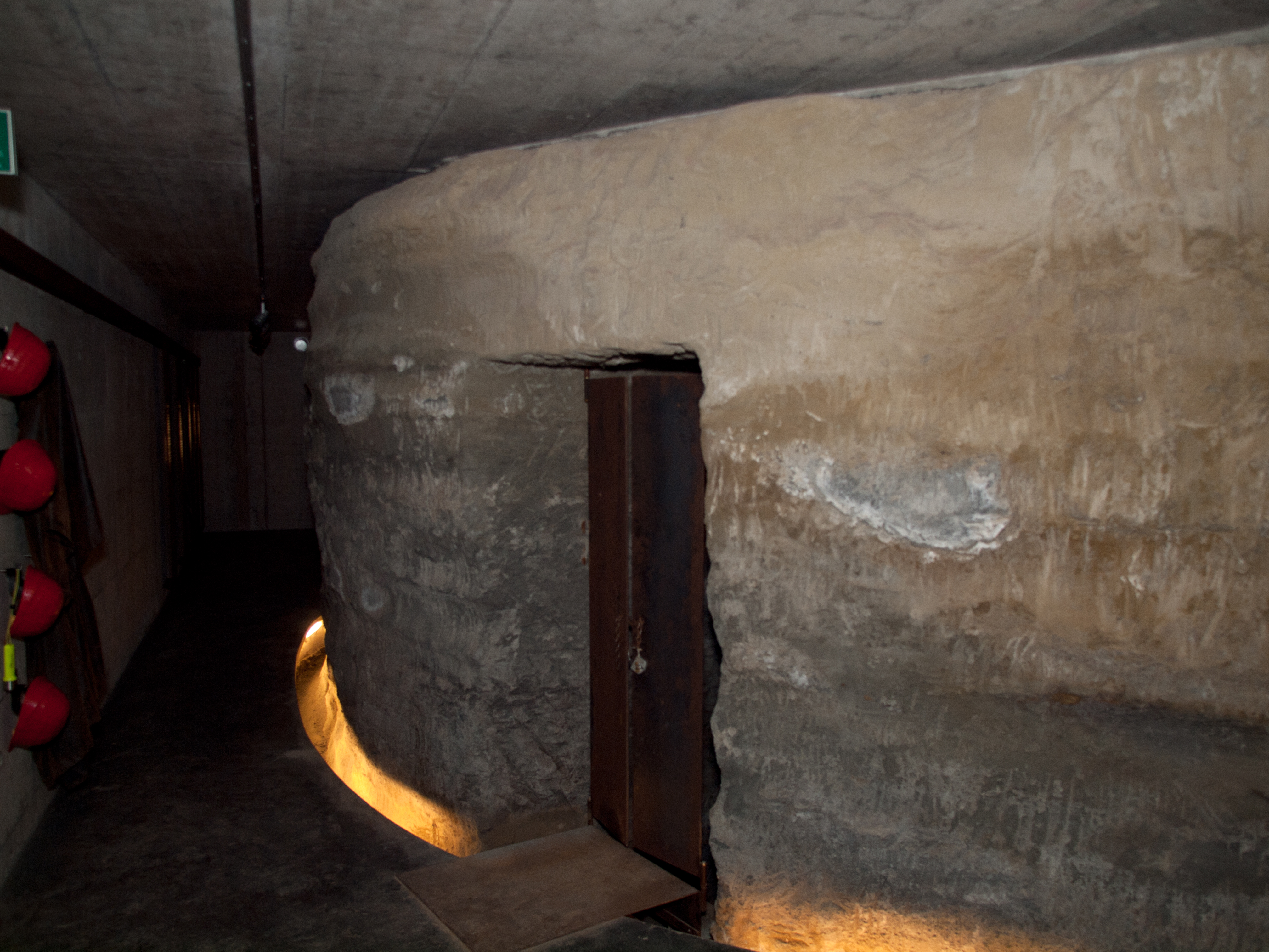 Der Eingang zu einem MEyerischen Stollen im dritten Untergeschoss des Bahnhof Aarau (Besuchsraum des Museum Aarau)